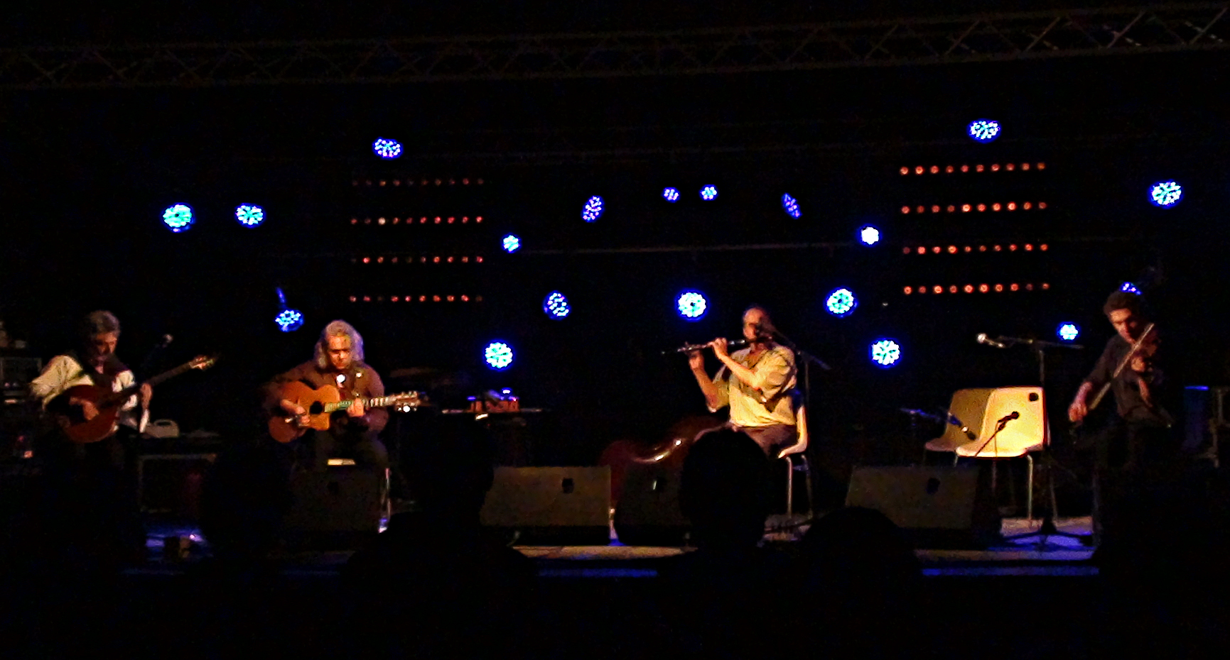 Kornog à Roscoff (Finistère, Bretagne) le 18 août 2012.